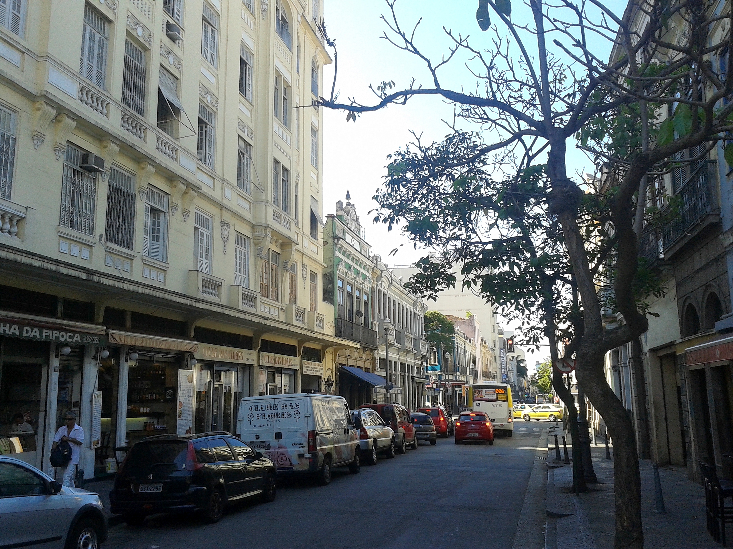 Rua Riachuelo, no centro do Rio de Janeiro (RJ, Brasil).